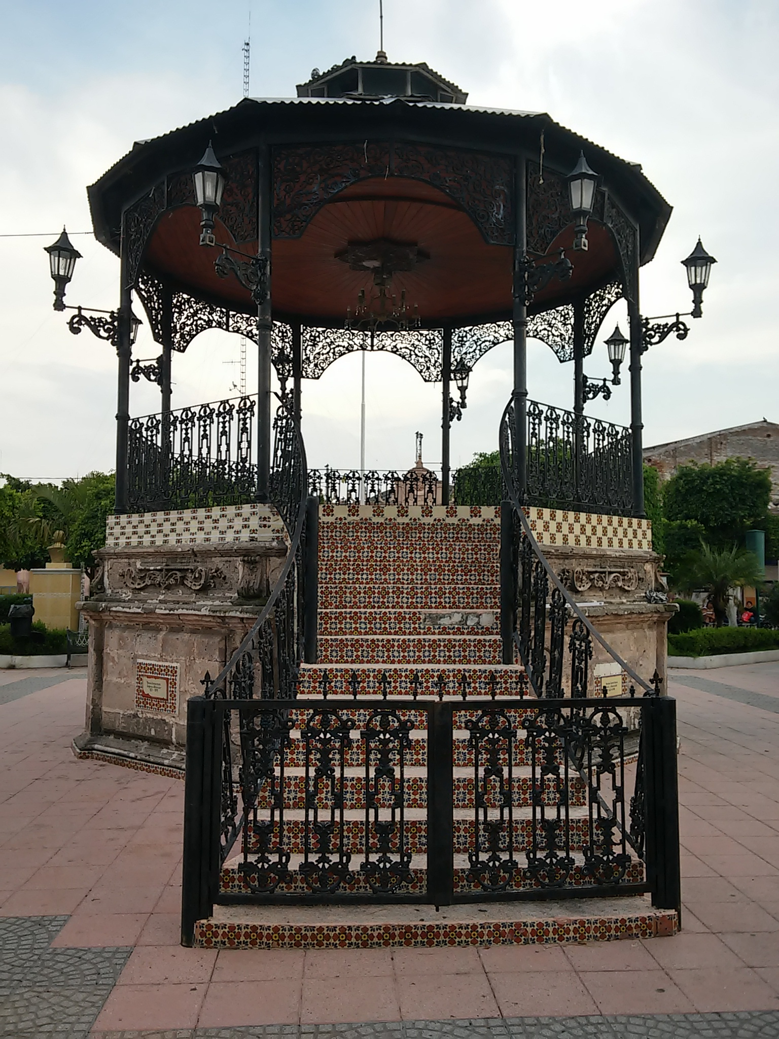 Kiosco de la plaza principal de Yurécuaro, Michoacán